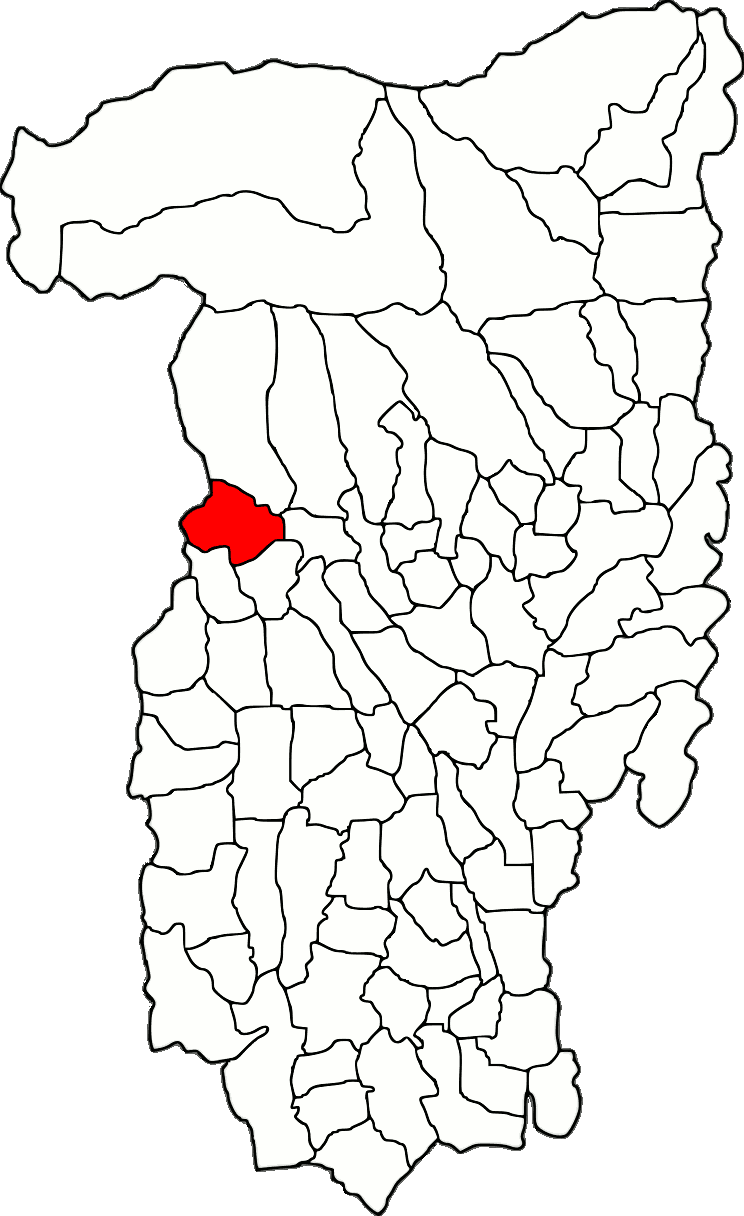 Lage der Gemeinde Slătioara im Kreis Vâlcea (RO).